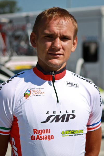 Siarhei Papok en 2011